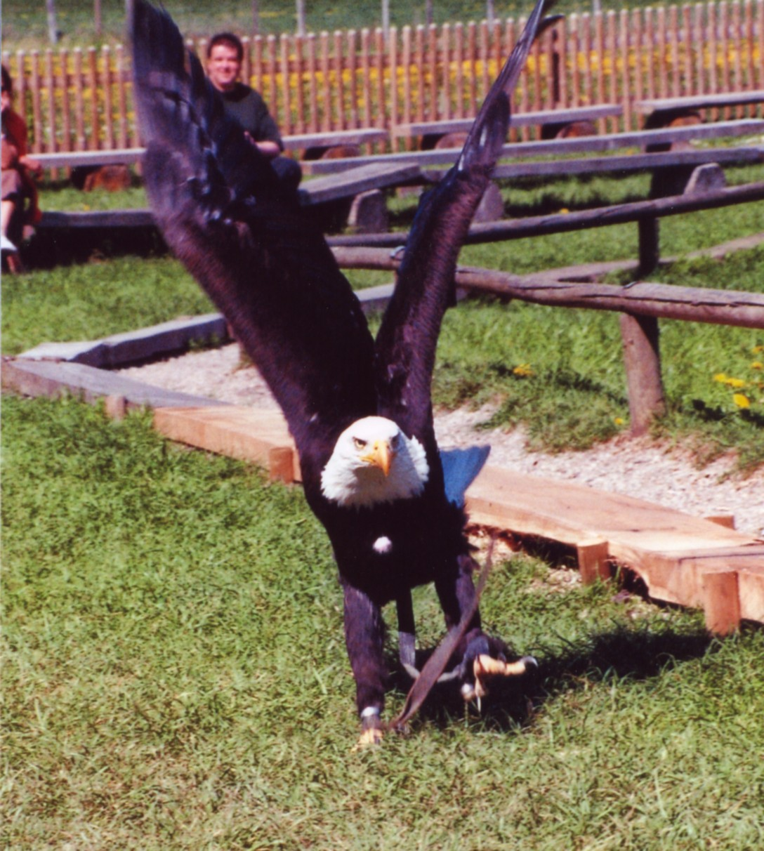 Weißkopfseeadler (Haliaeetus leucocephalus) im Wildpark Poing